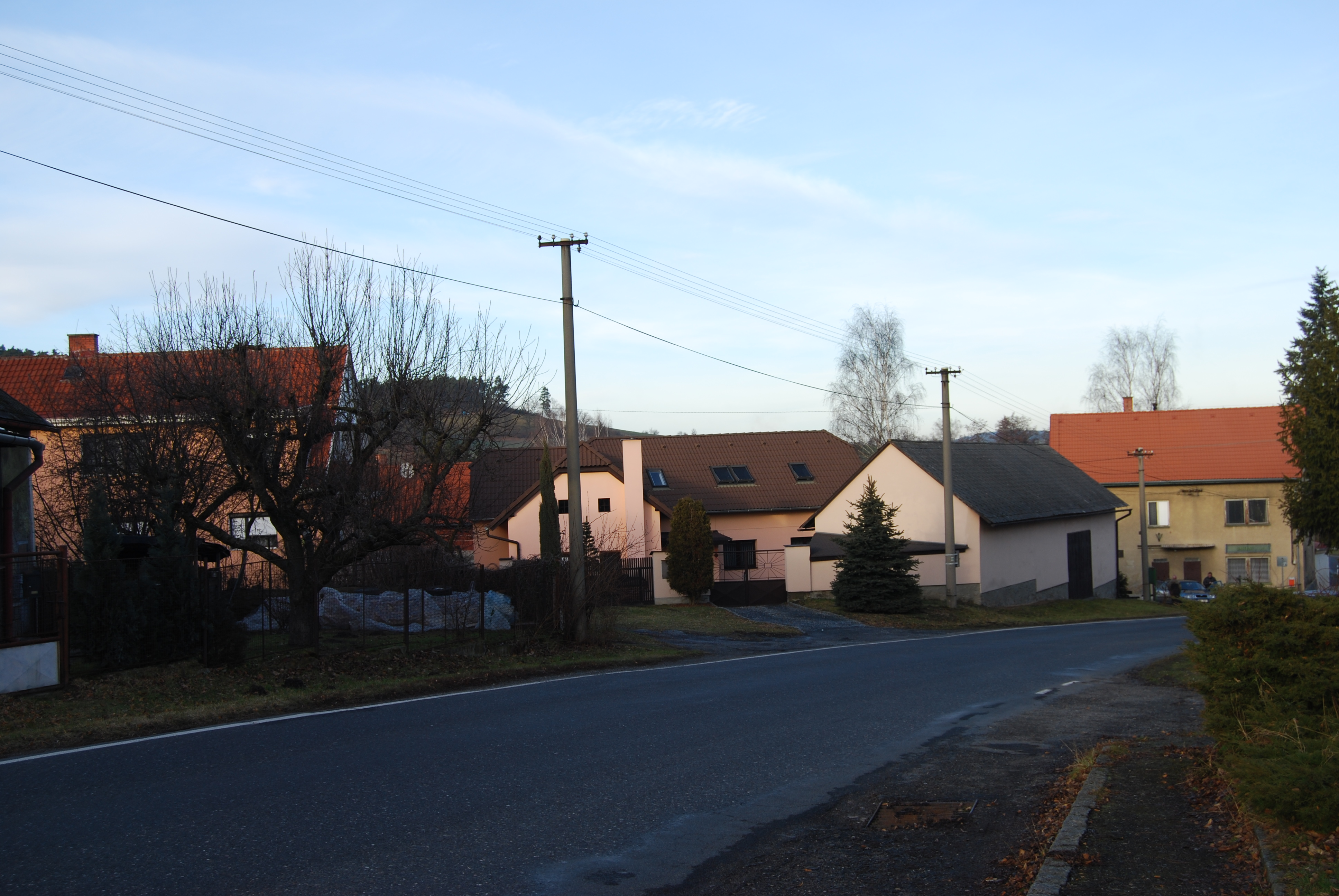 Libíň je část města Sedlčany v okrese Příbram. Česká republika.